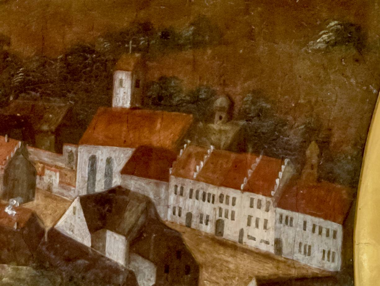 Bilder aus dem Schloß Bürgeln Hier Bilder von den Supraporten im ersten Stock des Schloßes. Es sind Bilder der Probsteien des Kloster St. Blasien und einige Füllbilder in einem später erstellten Flügel Bonndorf 1660 ARX ET PAGVS BONDORF QVEMVNACVMCOMITATV COGNOMINE ABBAS MARTINVS I. D. BLASIO ACQVISIVIT M.D.C.I.X